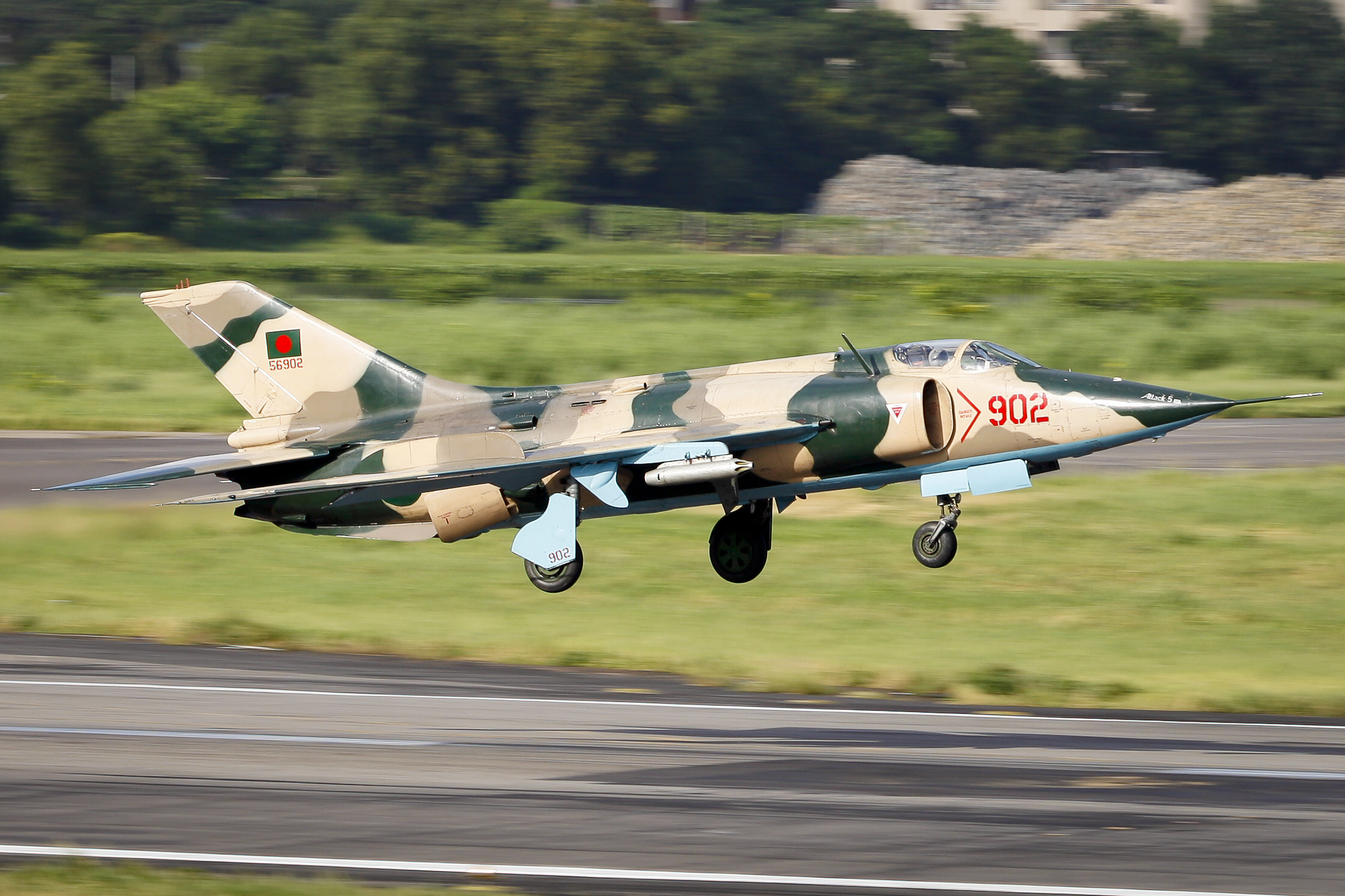 902 Nanchang A-5 Landing